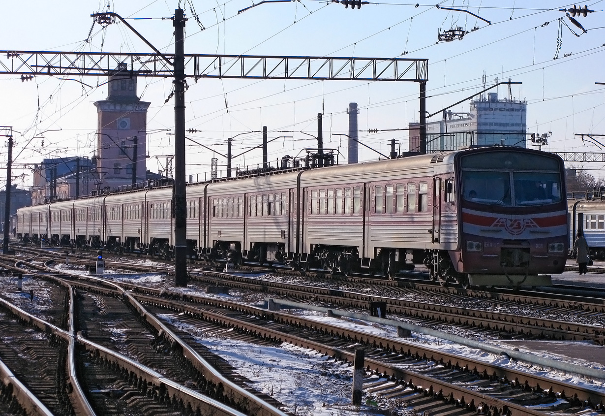 Електропоїзд ЕПЛ9Т-009